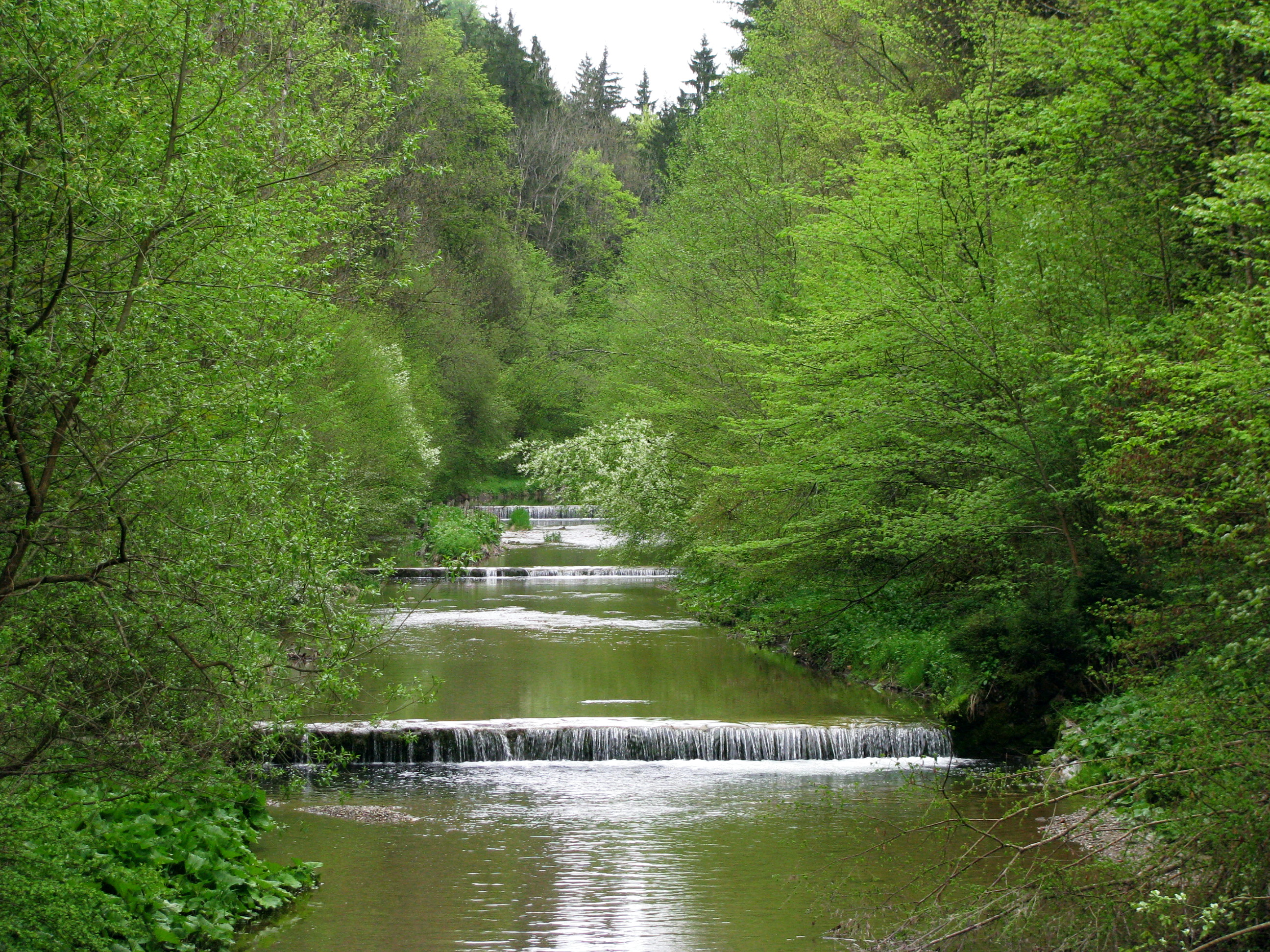 Die Schlierach kurz vor ihrer Mündung in die Mangfall.